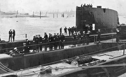 מציאת הצוללת אח"י דקר.